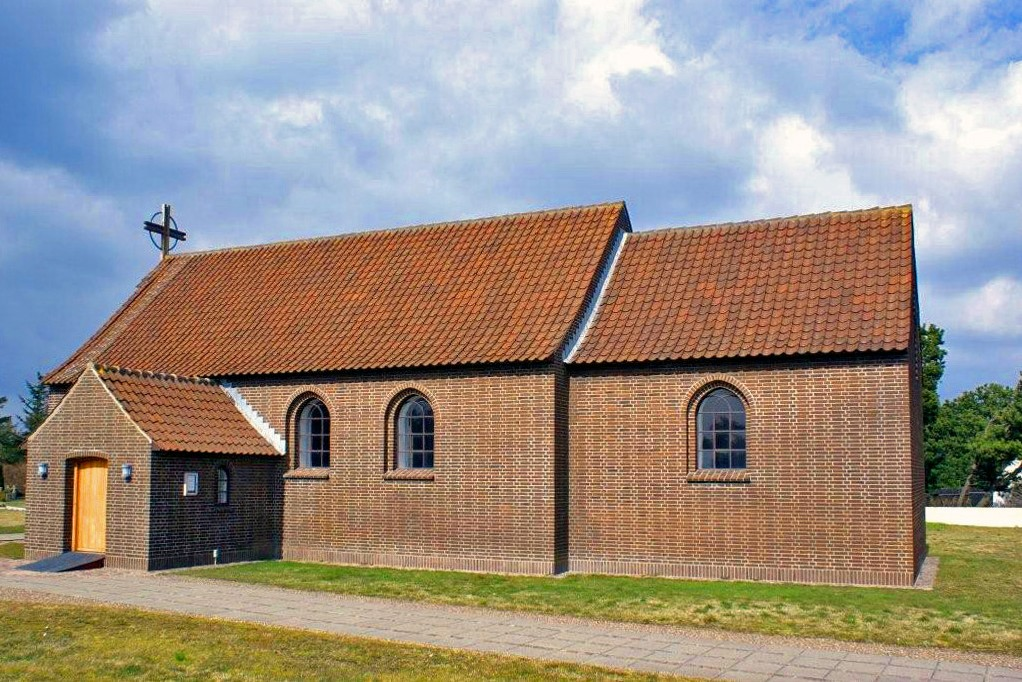 fra syd